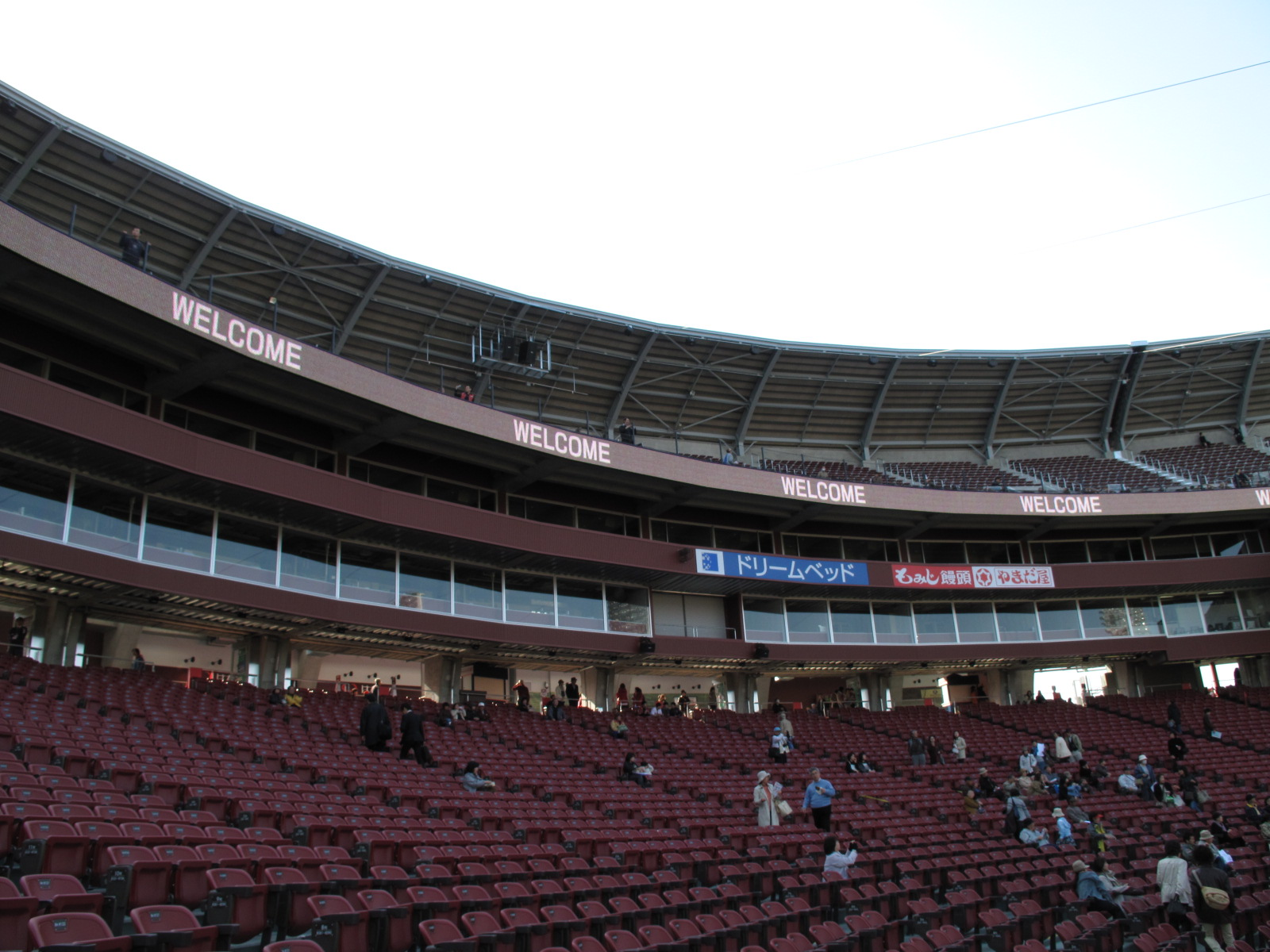 マツダスタジアム、バックネット裏の内野スタンドを撮影